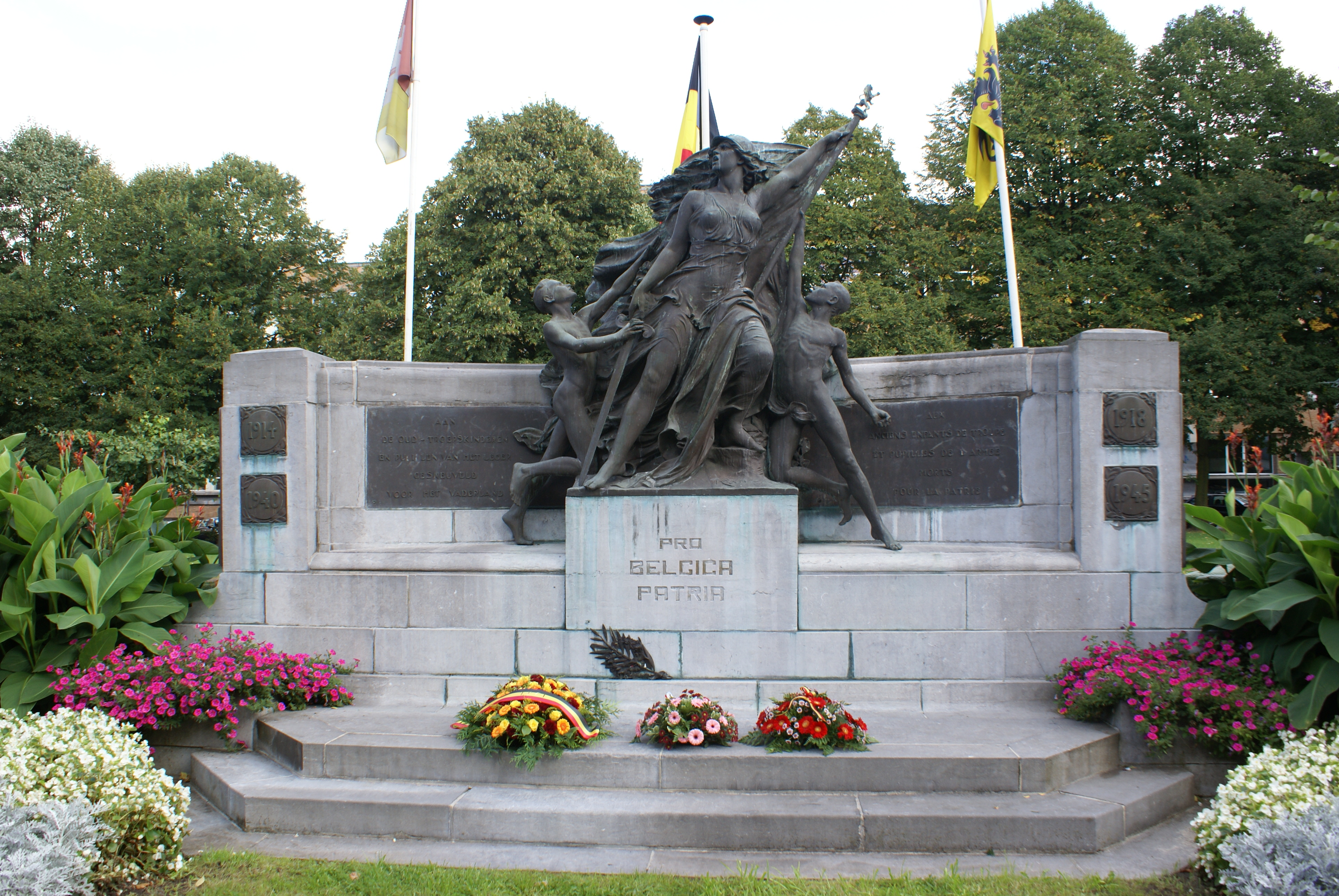 Centraal een bronzen beeld van een vrouw geflankeerd door twee kinderen. De vrouw is een allegorie voor België dat de jonge Belgen te wapen roept.